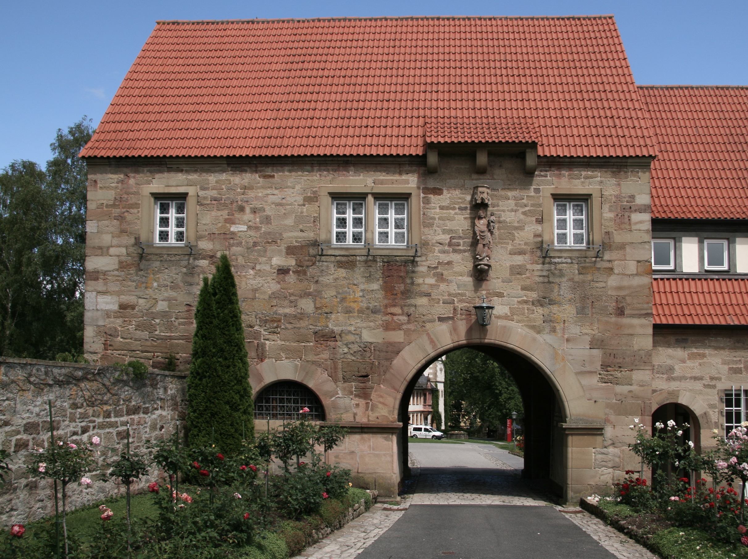 Torhaus Kloster Maria Bildhausen, erbaut 1788 von Abt Schlimbach